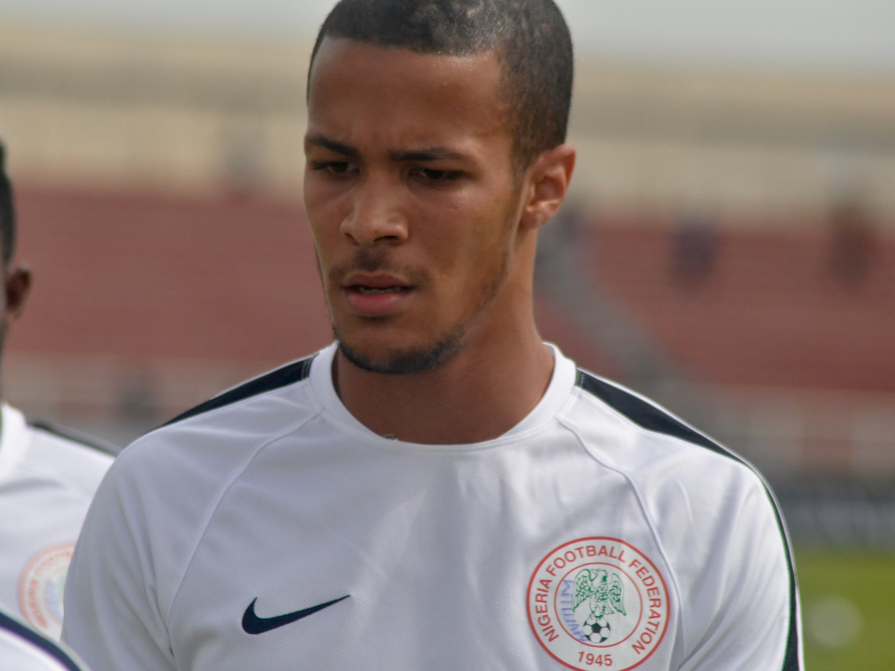 Internationaal debuut Nigeria 13-06-2015